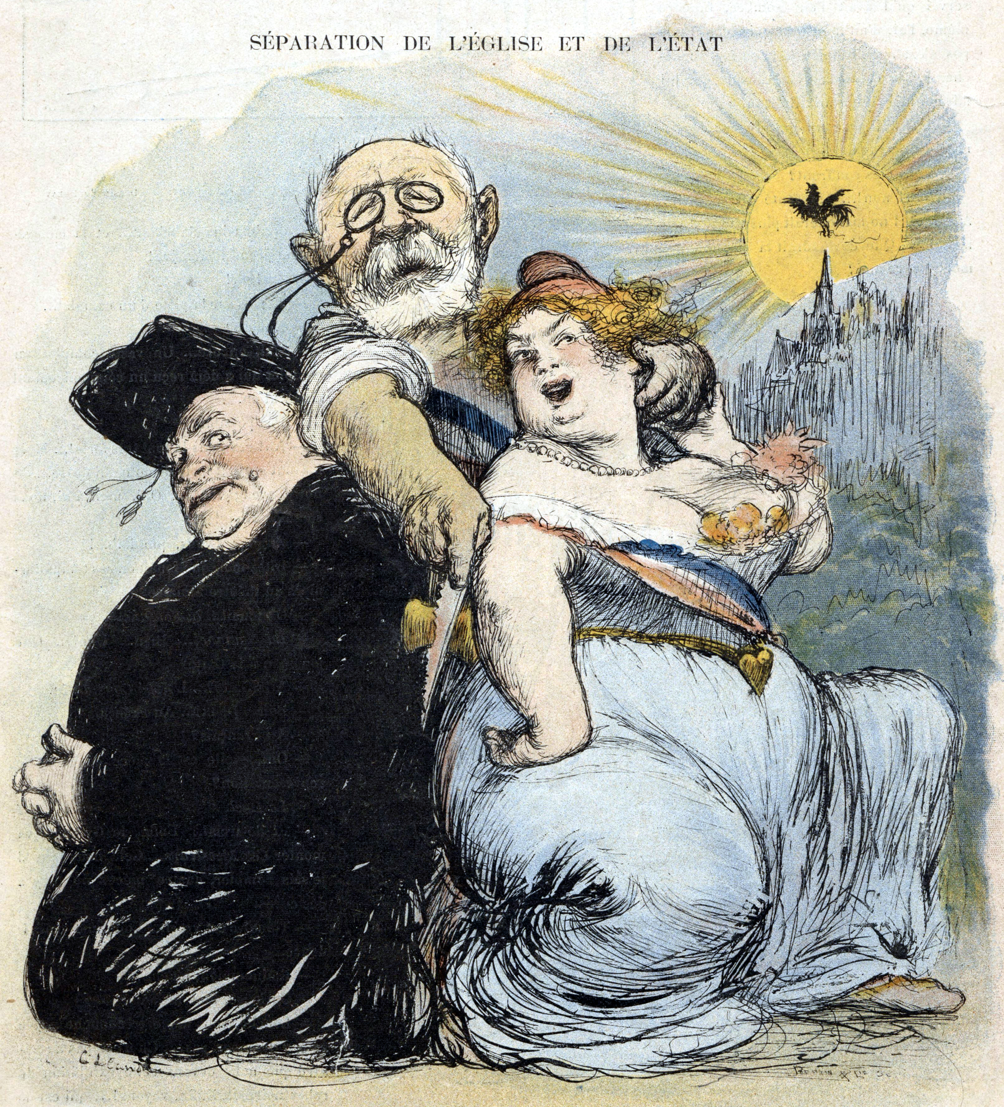 Caricature from "Le Rire". The cropped caption said: "Et M. Bienvenu-Martin continue toujours avec beaucoup de Briand son opération chirurgicale." (:fr:Séparation des Églises et de l'État en 1905) (:en:1905 French law on the separation of Church and State)